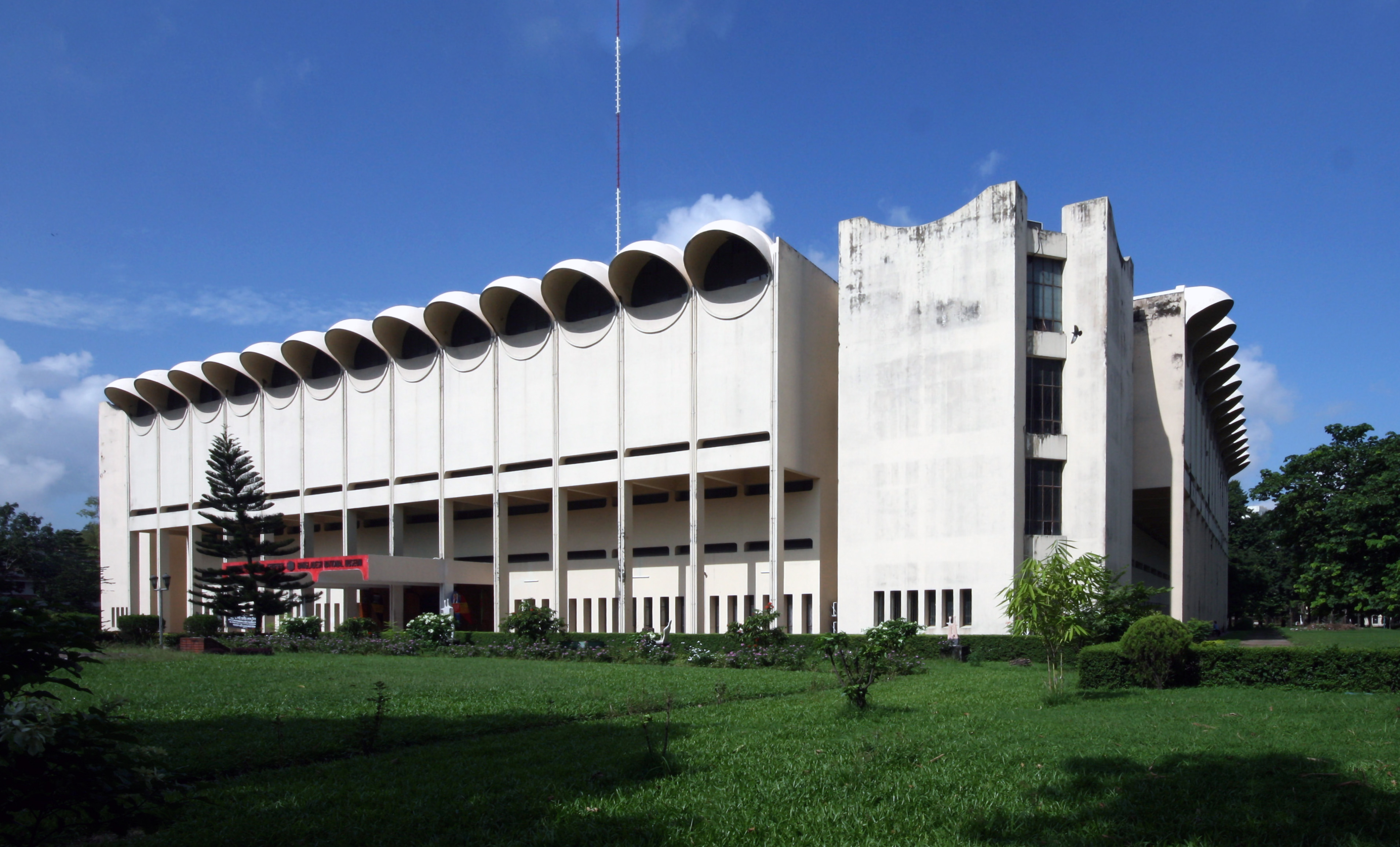 বাংলাদেশ জাতীয় জাদুঘর